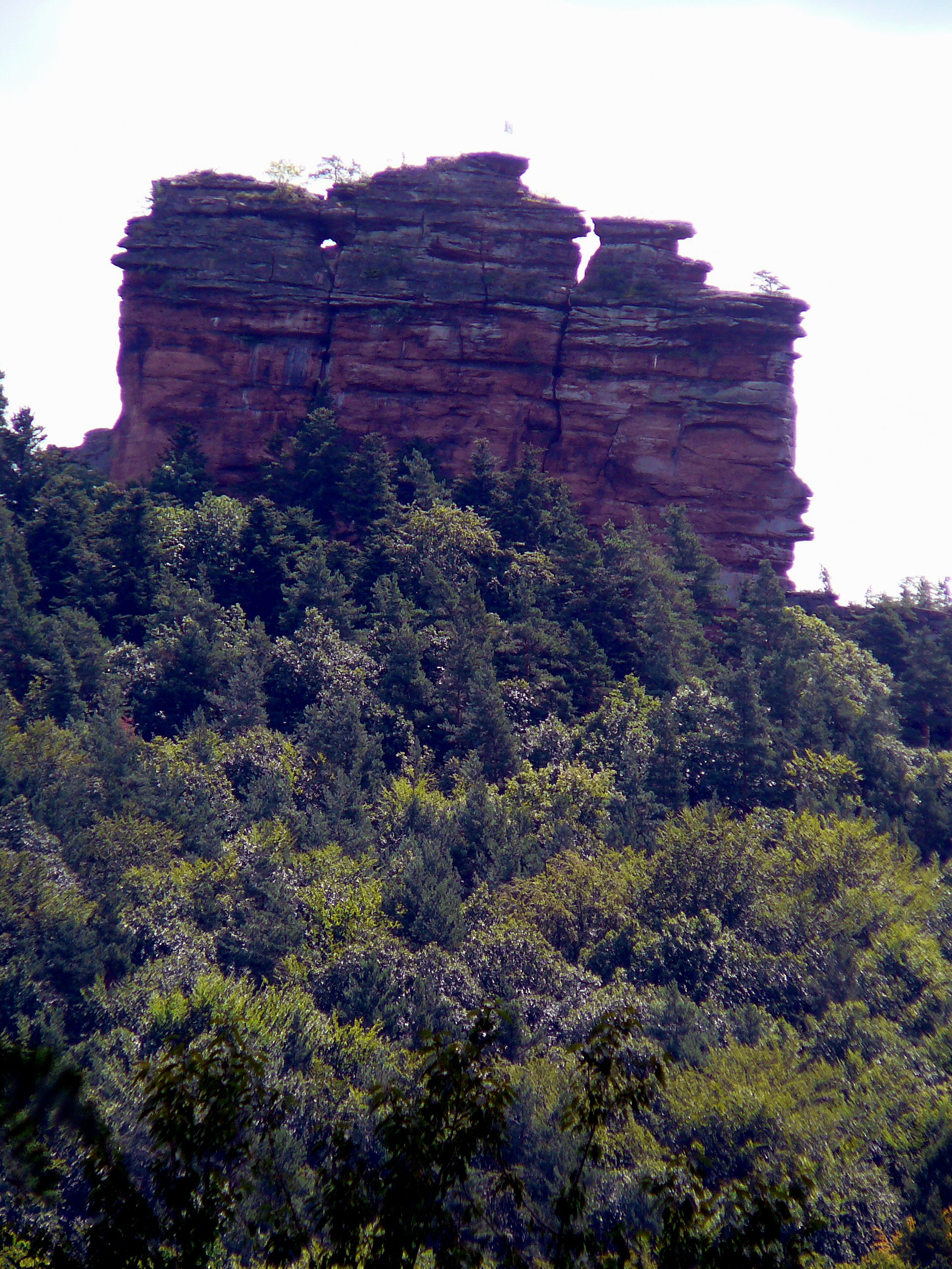 Asselstein bei Annweiler: Blick von Westen auf seine Breitseite